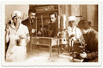 מעבדה בבית החולים בנווה שלום, 1919